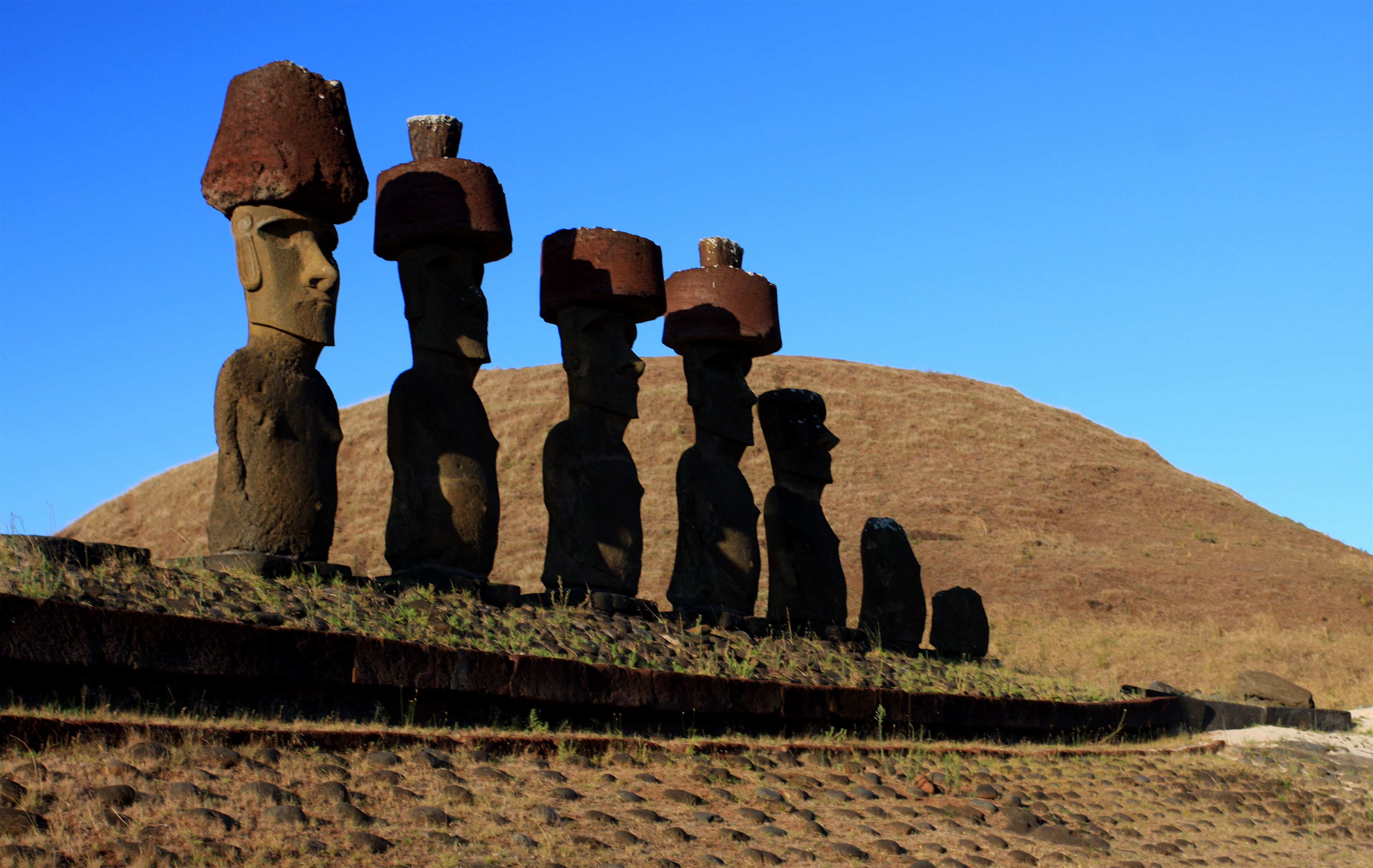 Ahu Nau Nau - Easter Island